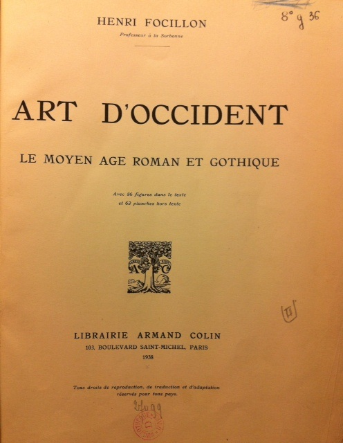 Henri Focillon, "Art d'Occident : le Moyen-Âge roman et gothique", Paris : A. Colin, 1938